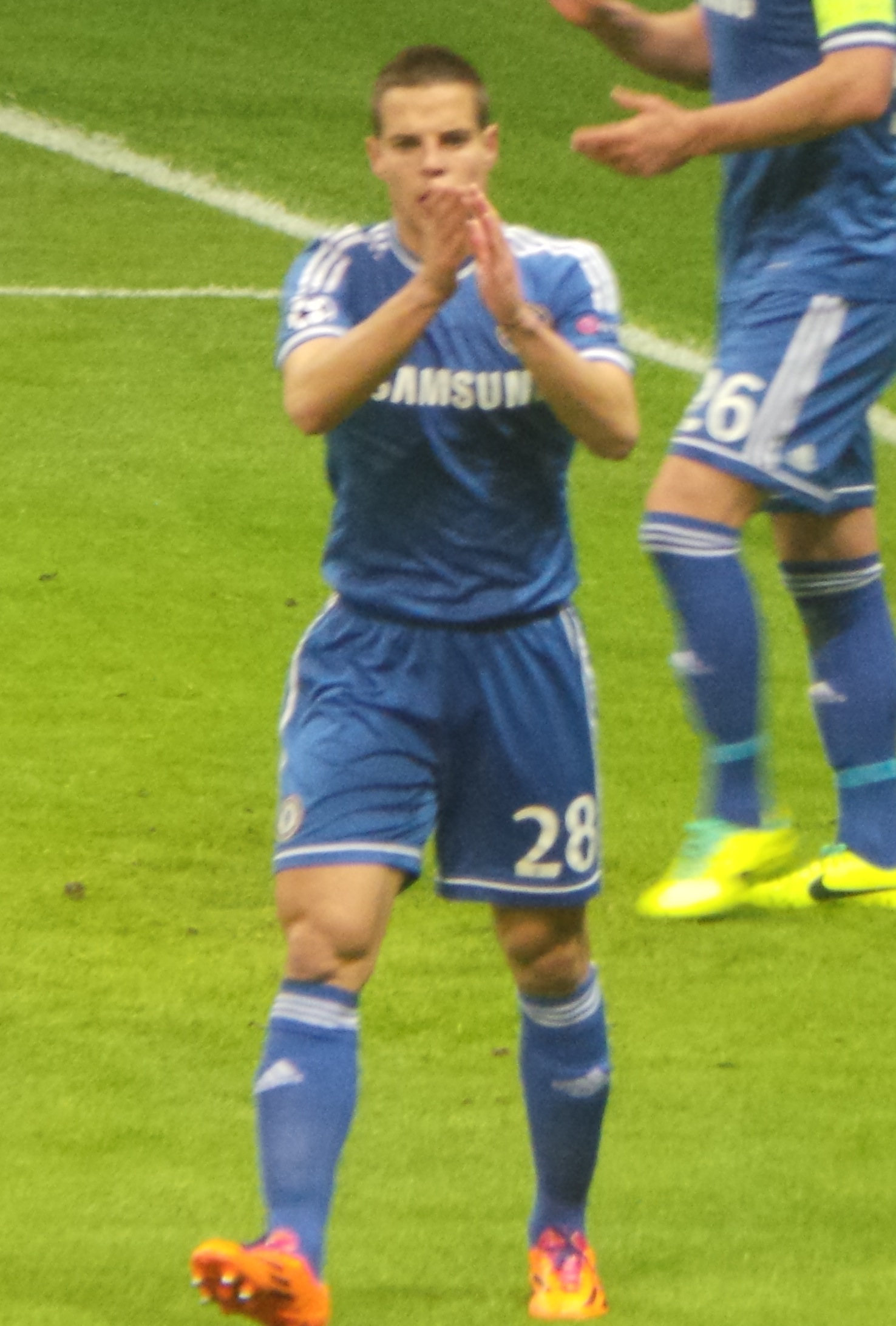 César Azpilicueta